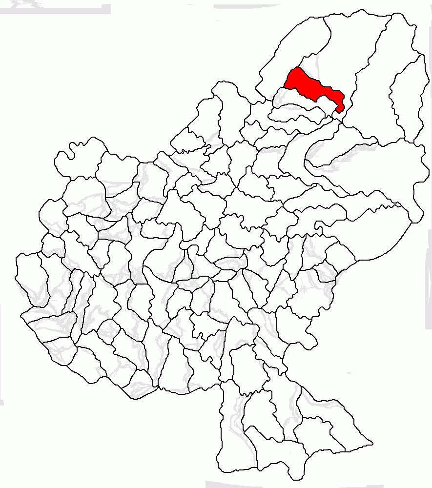 Categorie:Hărţi ale judeţului Mureş